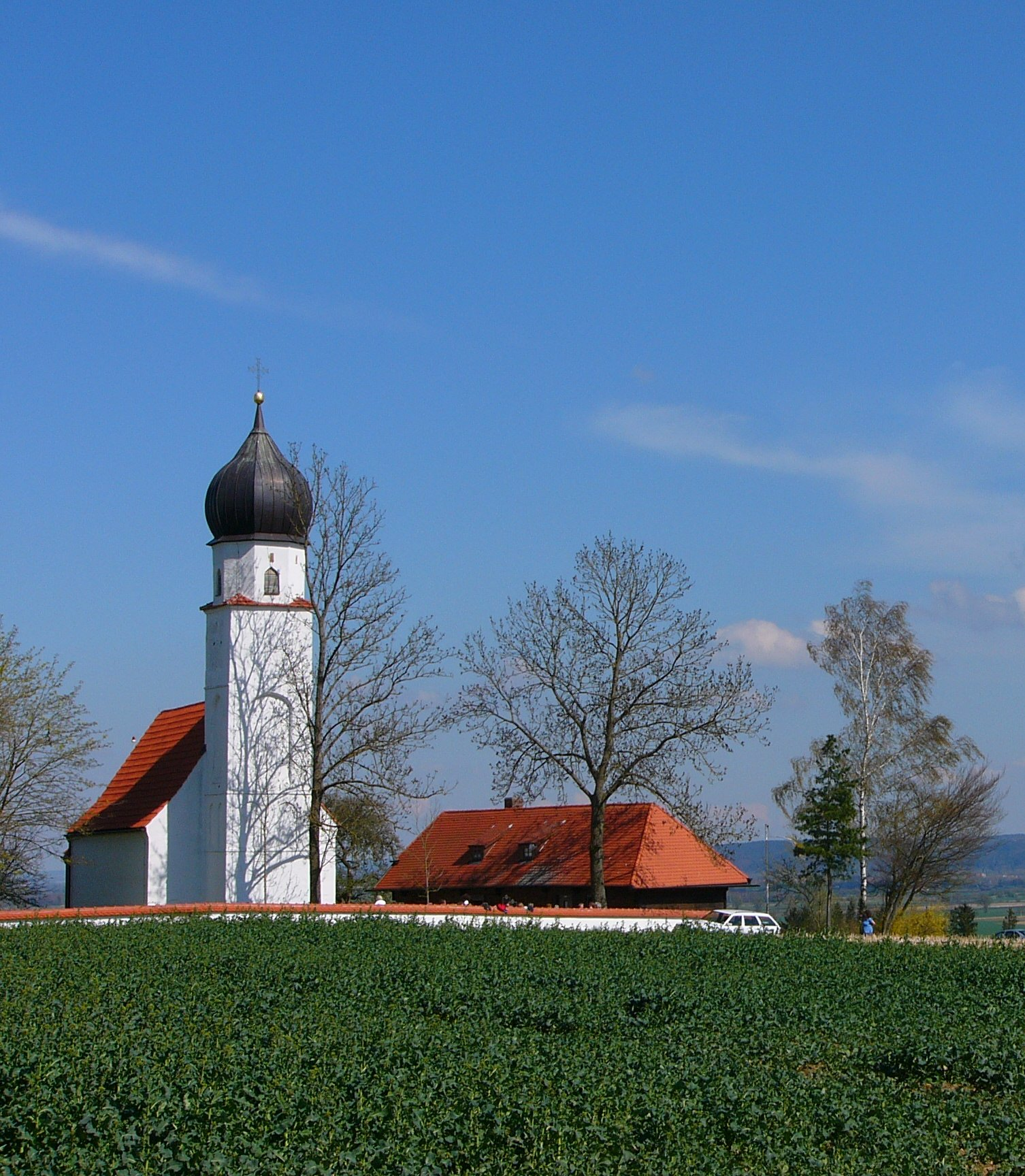 Kirche St. Wolgang. Frühgotische Anlage um 1300; mit Ausstattung.This is a photograph of an architectural monument.